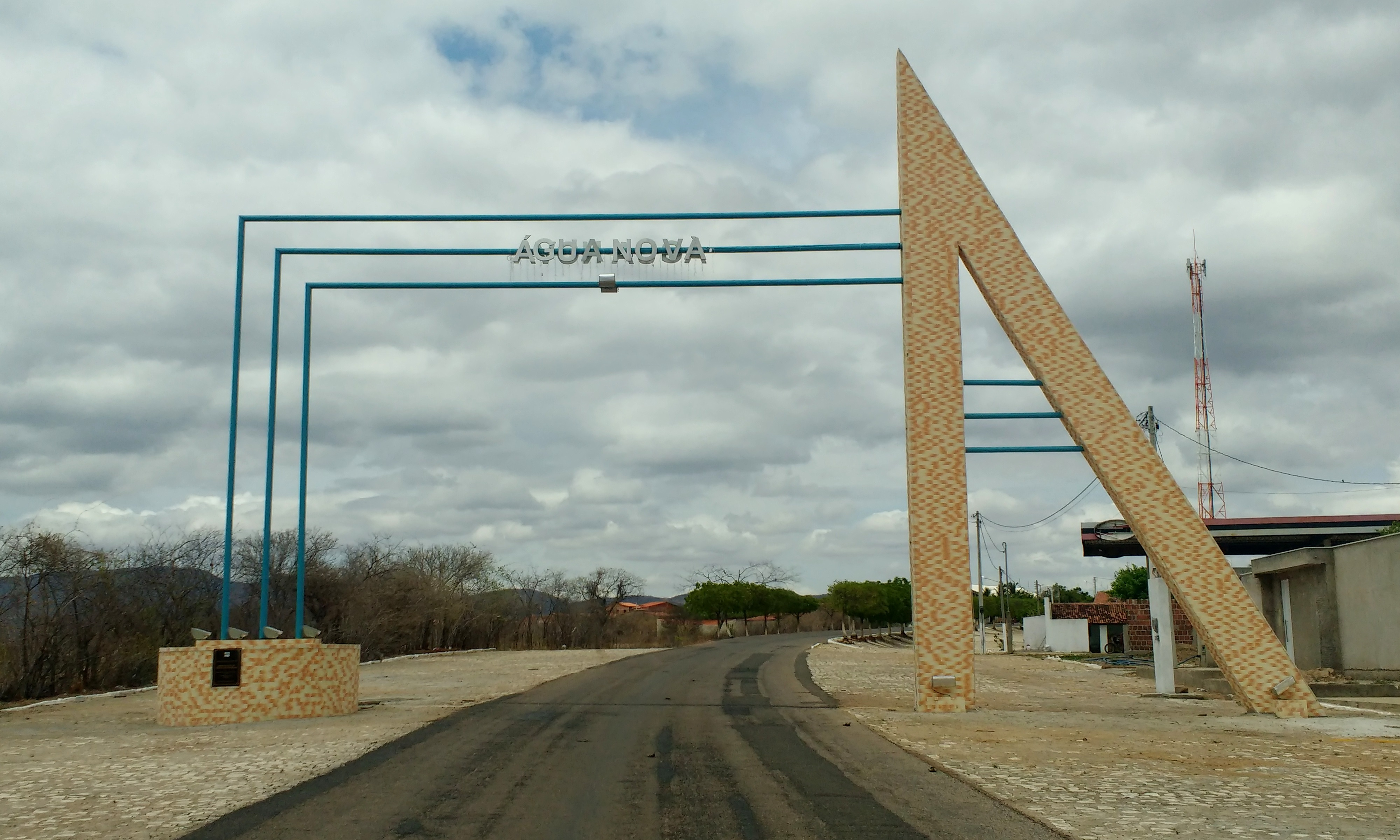 Pórtico às margens da rodovia RN-079, na entrada de Água Nova, Rio Grande do Norte (Brasil)